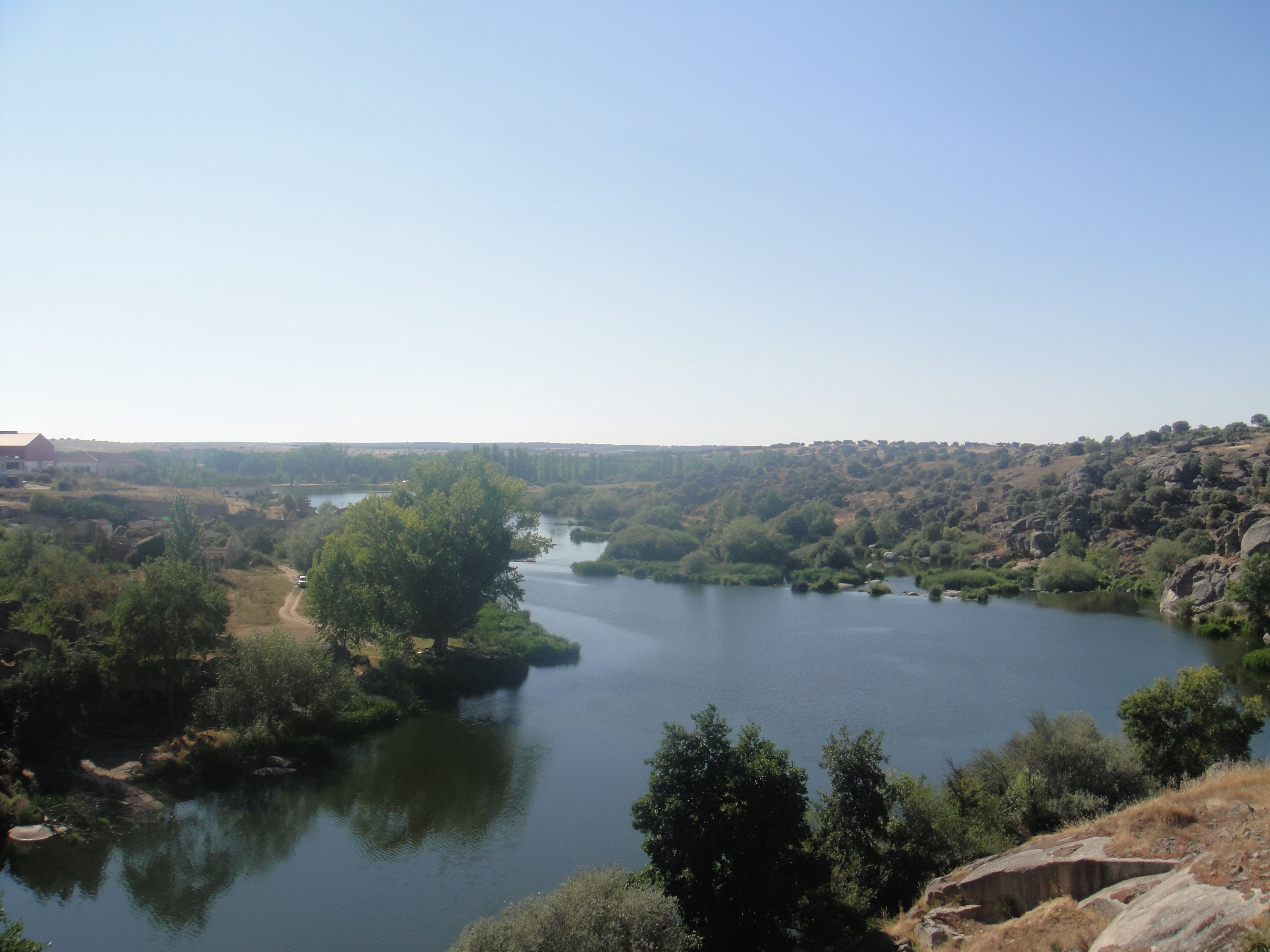 El río Tormes a su paso por Ledesma, provincia de Salamanca, (España).